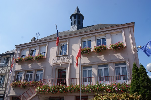 façade